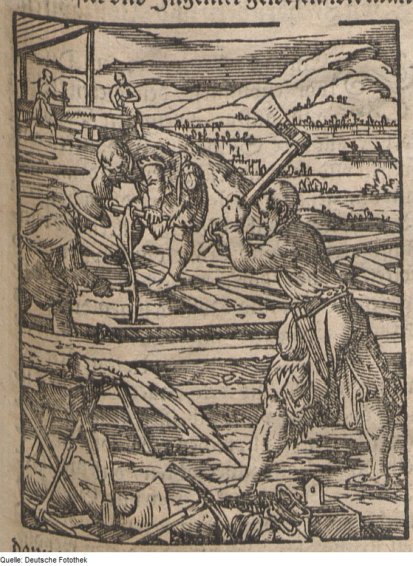 Original image description from the Deutsche FotothekStändebuch & Beruf & Handwerk & Holzverarbeitung